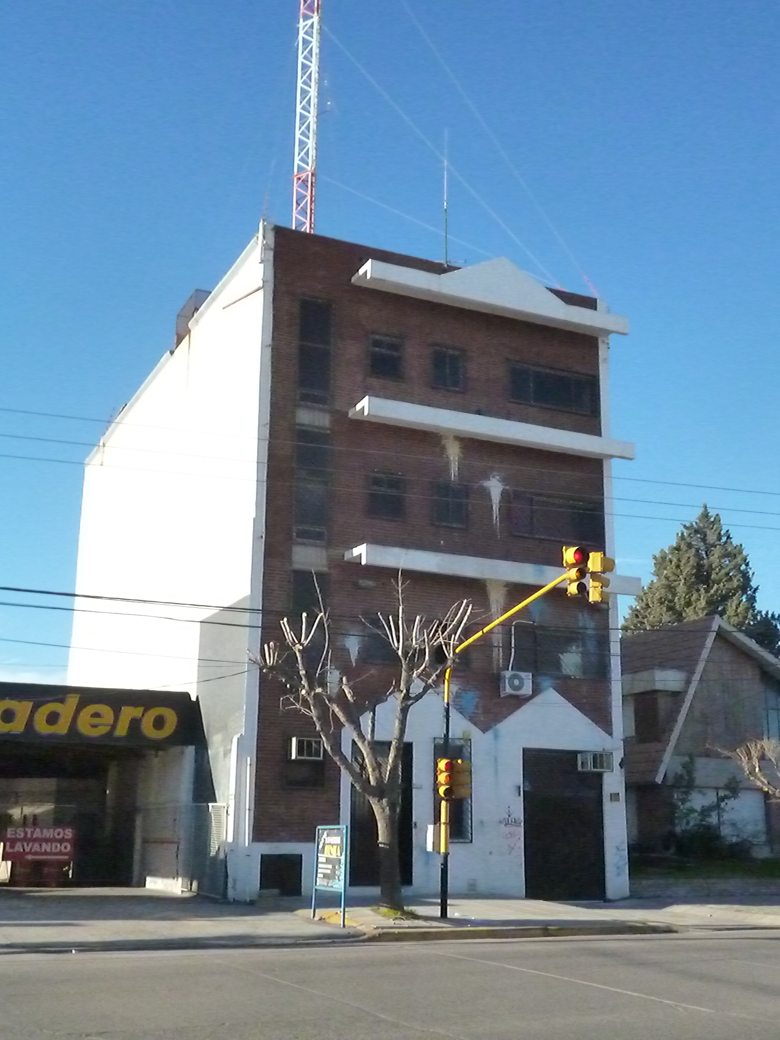 Edificio en Trelew, Chubut. Alberga las oficinas de la SIDE (actual Secretaría de Inteligencia).